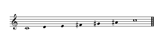 Description : Gamme par tons Source : Personnelle Licence : GFDL